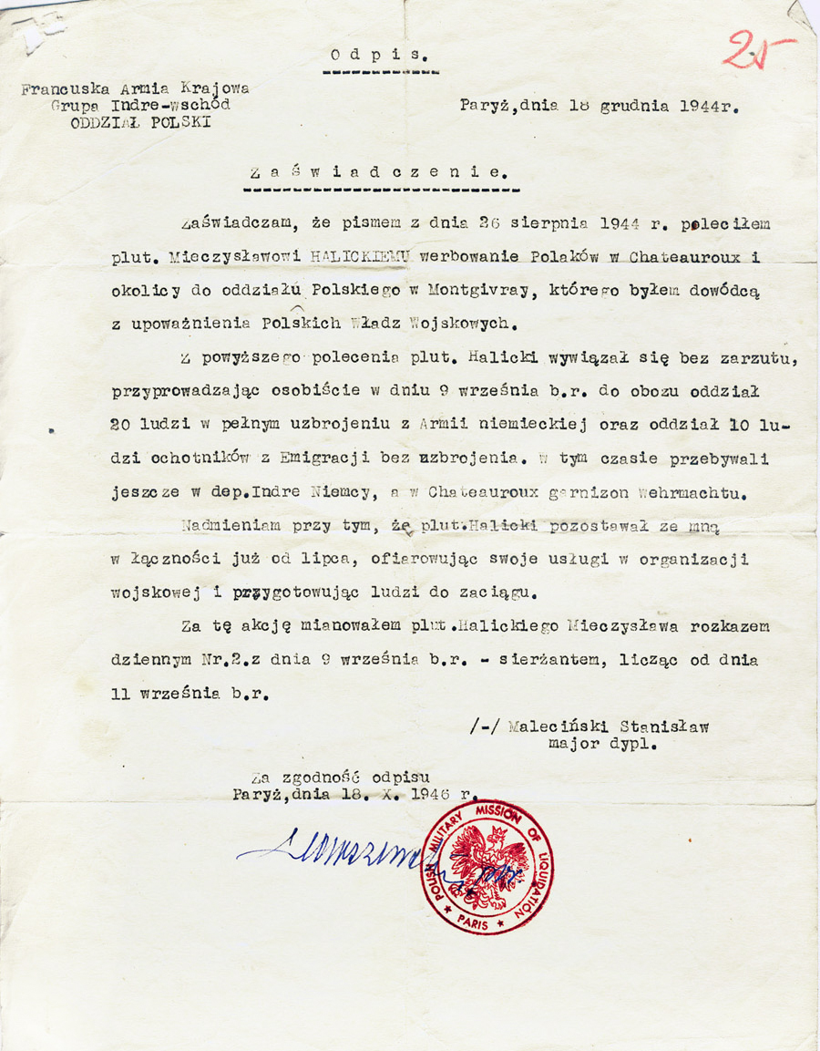 Zaświadczenie AK